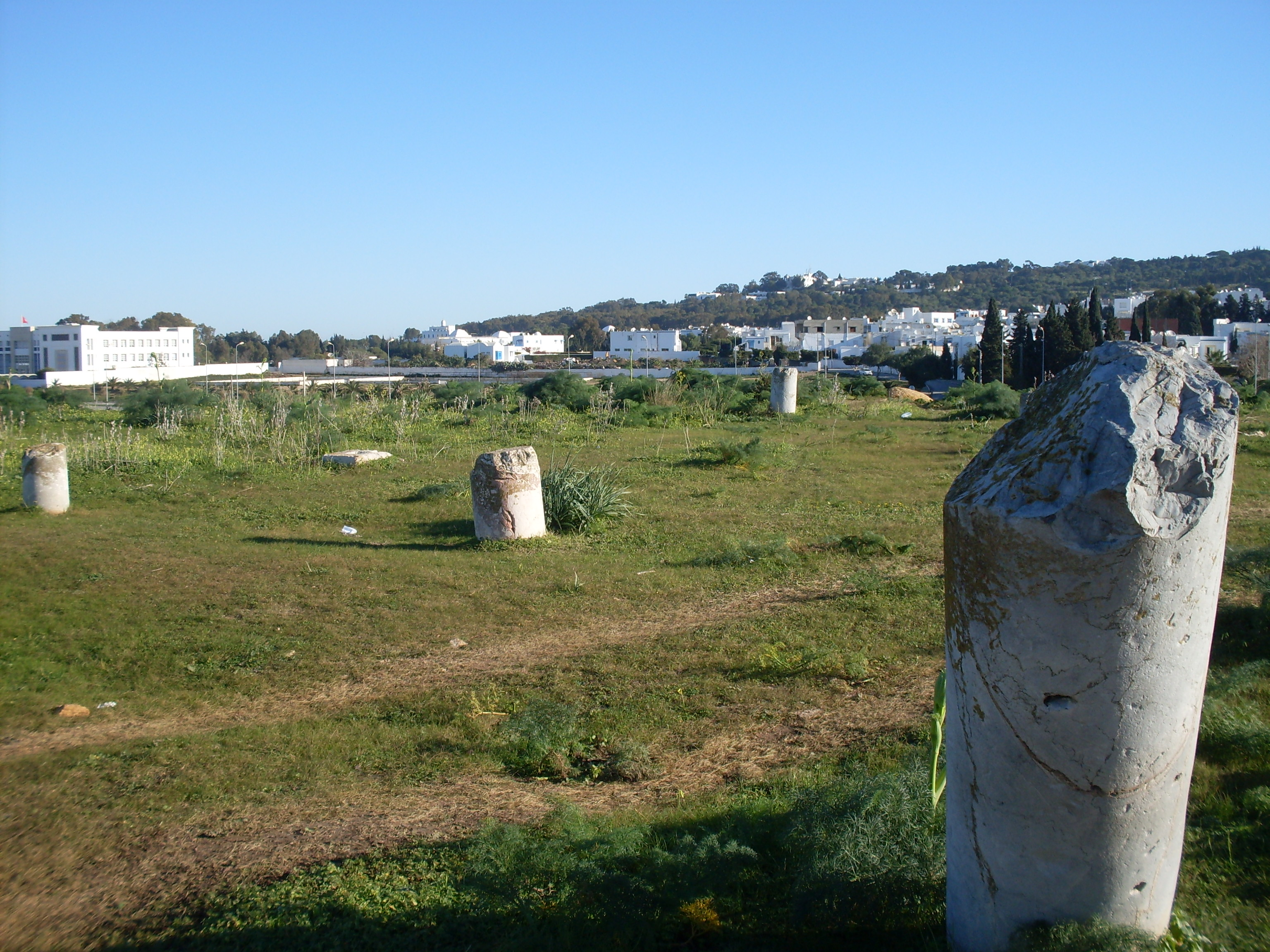 Colonnes probablement sur l'emplacement de la basilique majorum en face de la Confession restaurée à l'occasion du Congrès eucharistique de 1930